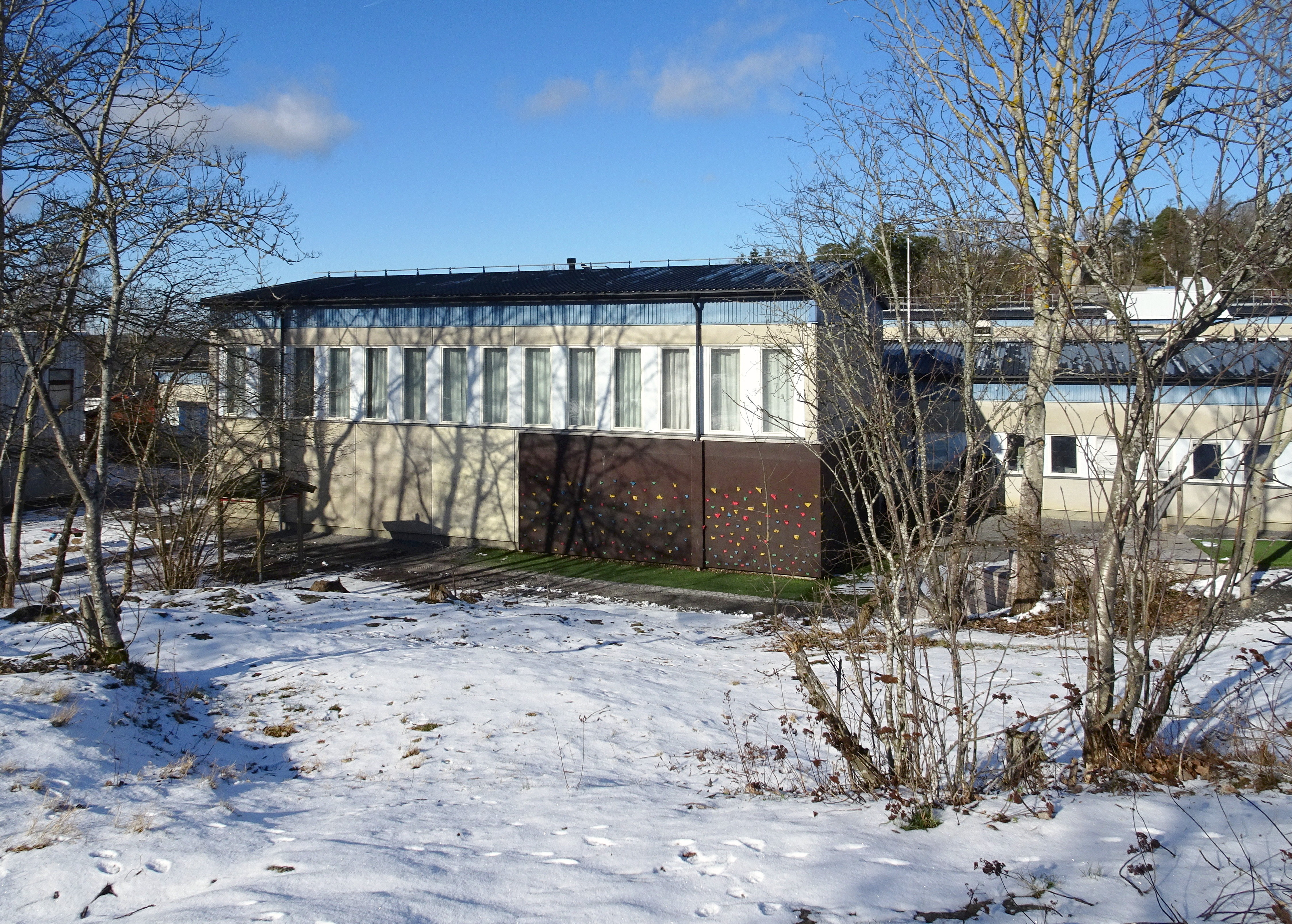 Söderholmsskolan, Vårberg, Våruddsringen 202, arkitekt Bengt Hidemark & Gösta Danielsson (1971)